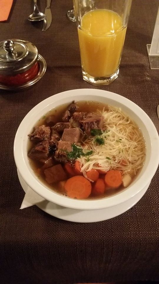 húsleves gazdagon, Fót, Fáy Présház